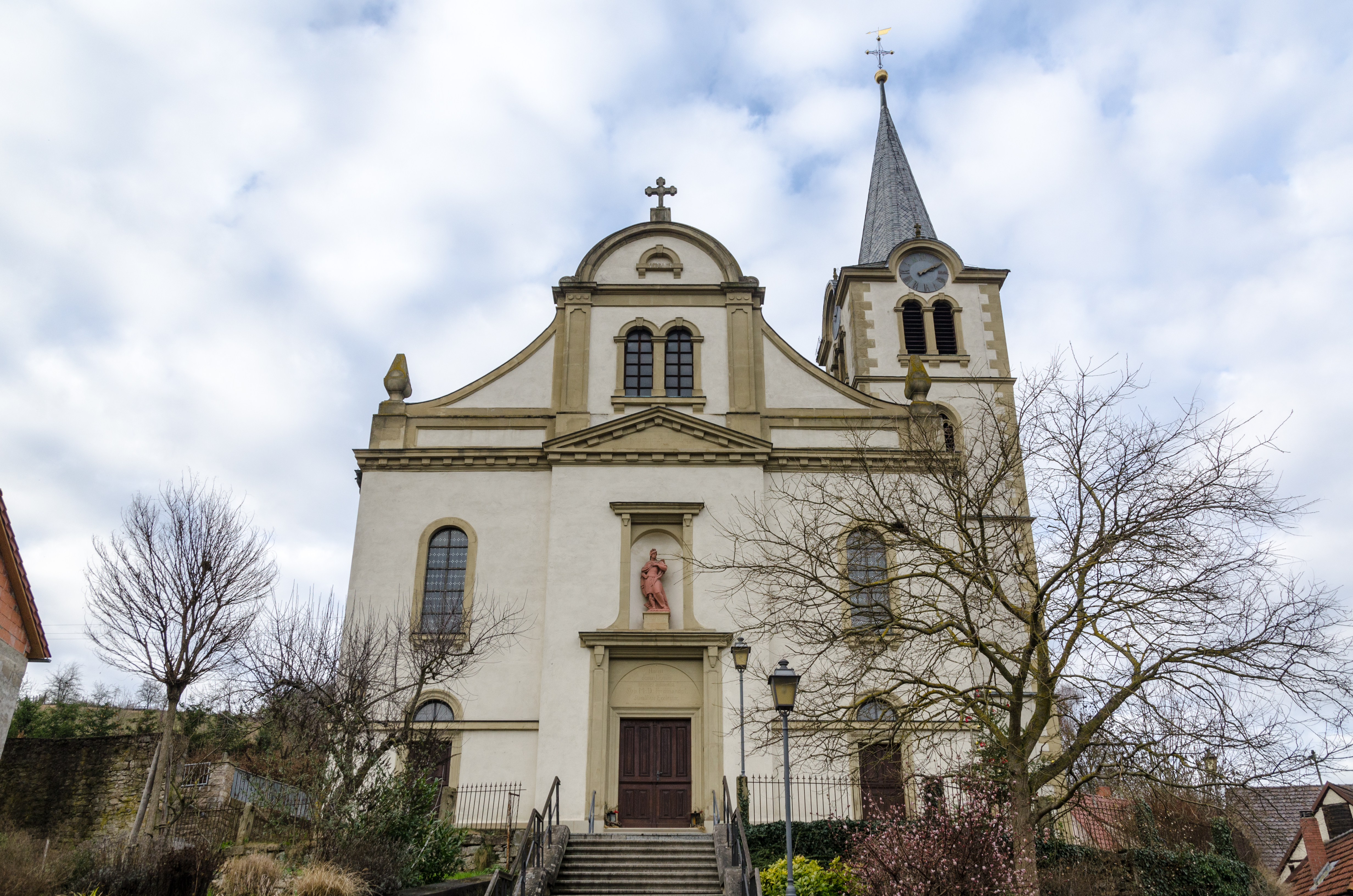 Arnstein, Halsheim, Katholische Filialkirche St. Sebastia